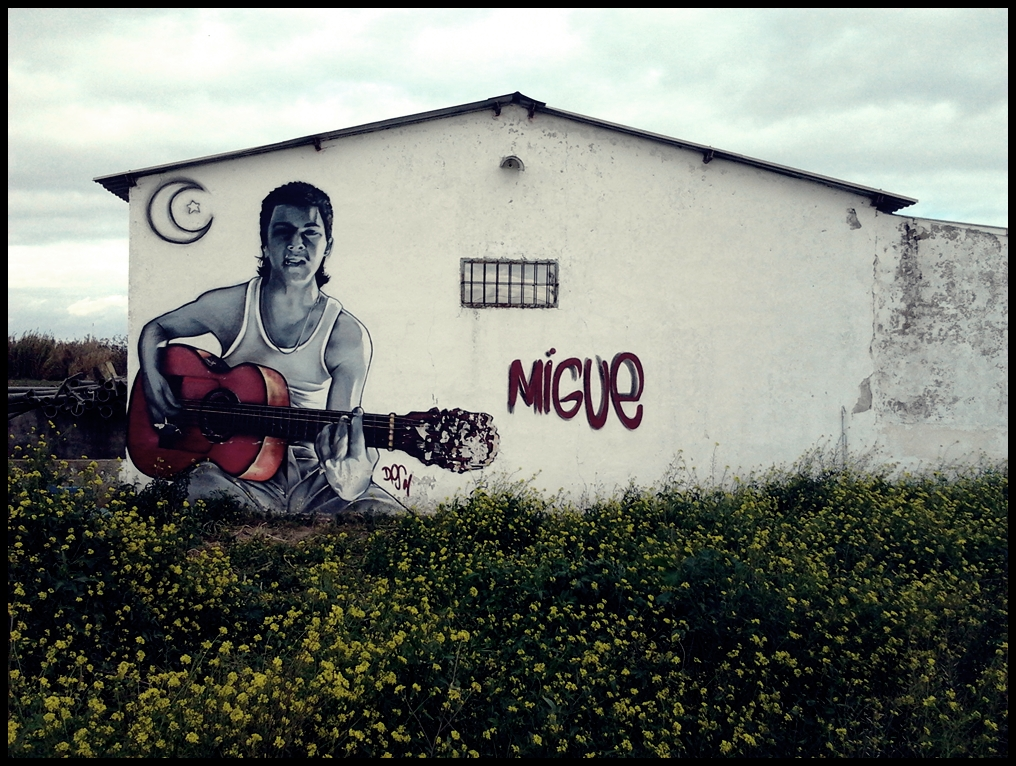 Miguel Ángel Benítez Gómez